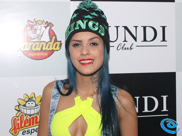 Mundi Club Cantora Tati Zaqui.